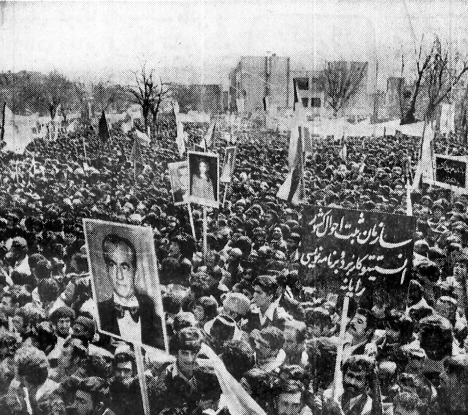 Manifestation de soutien au Chah et à la famille impériale à Tabriz en mars-avril 1978